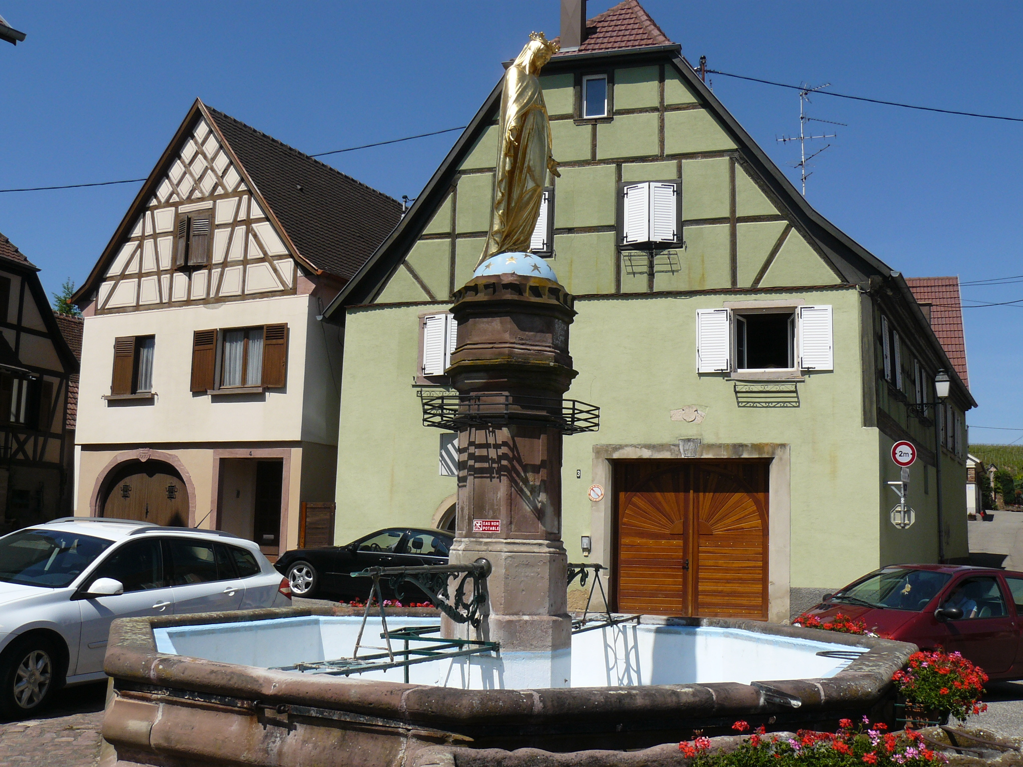 Fontaine avec statue de la Vierge (XIXe siècle)